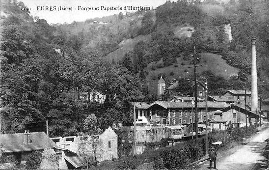 Carte Postale Ancienne. Fures, Forges et papeterie d´Hurtières. Tullins (Isère). Carte postale écrite sur le verso en 1925.